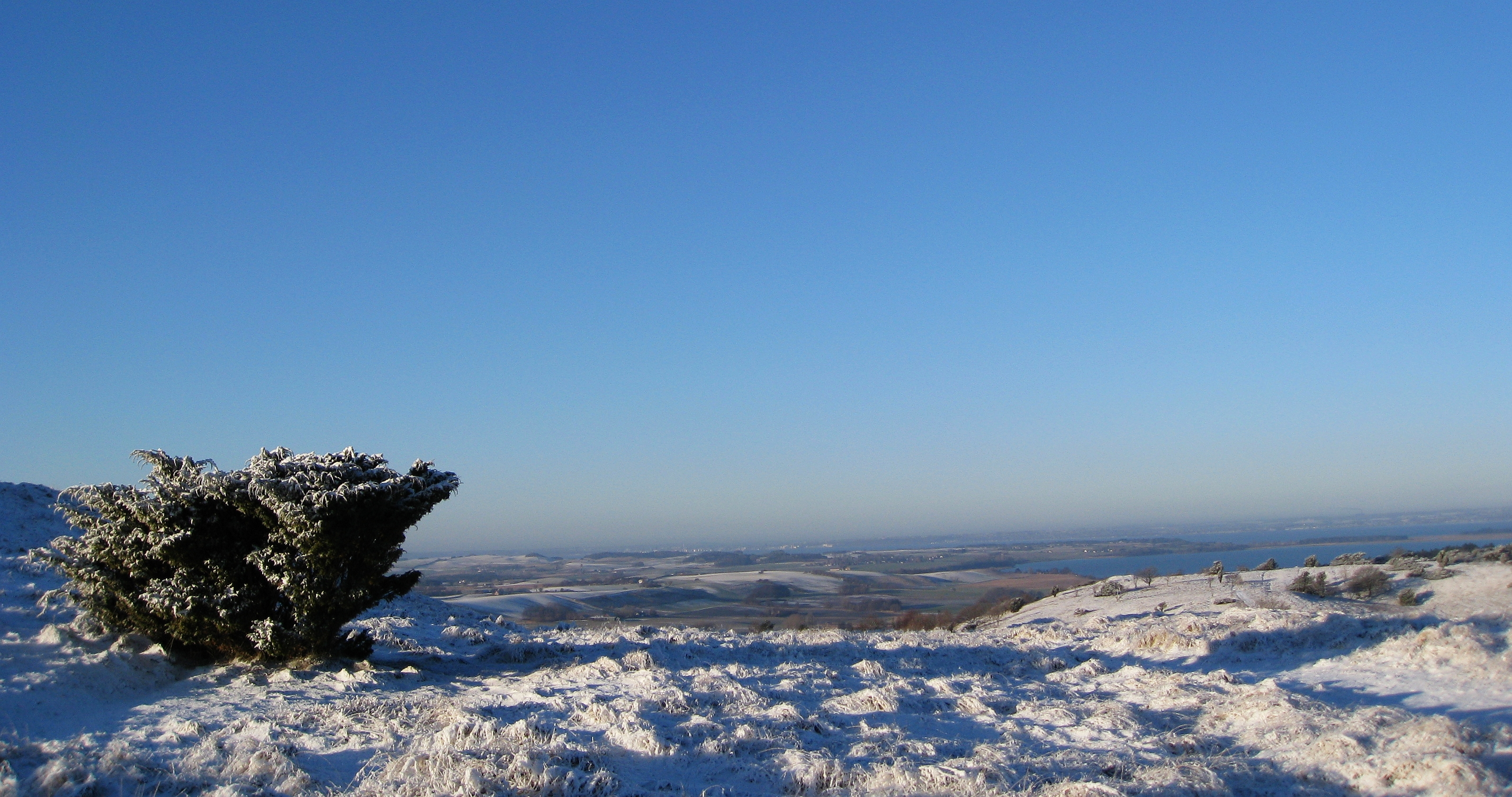 Trehøje, vinterudsigt i retning mod syd-vest, Begtrup Vig.